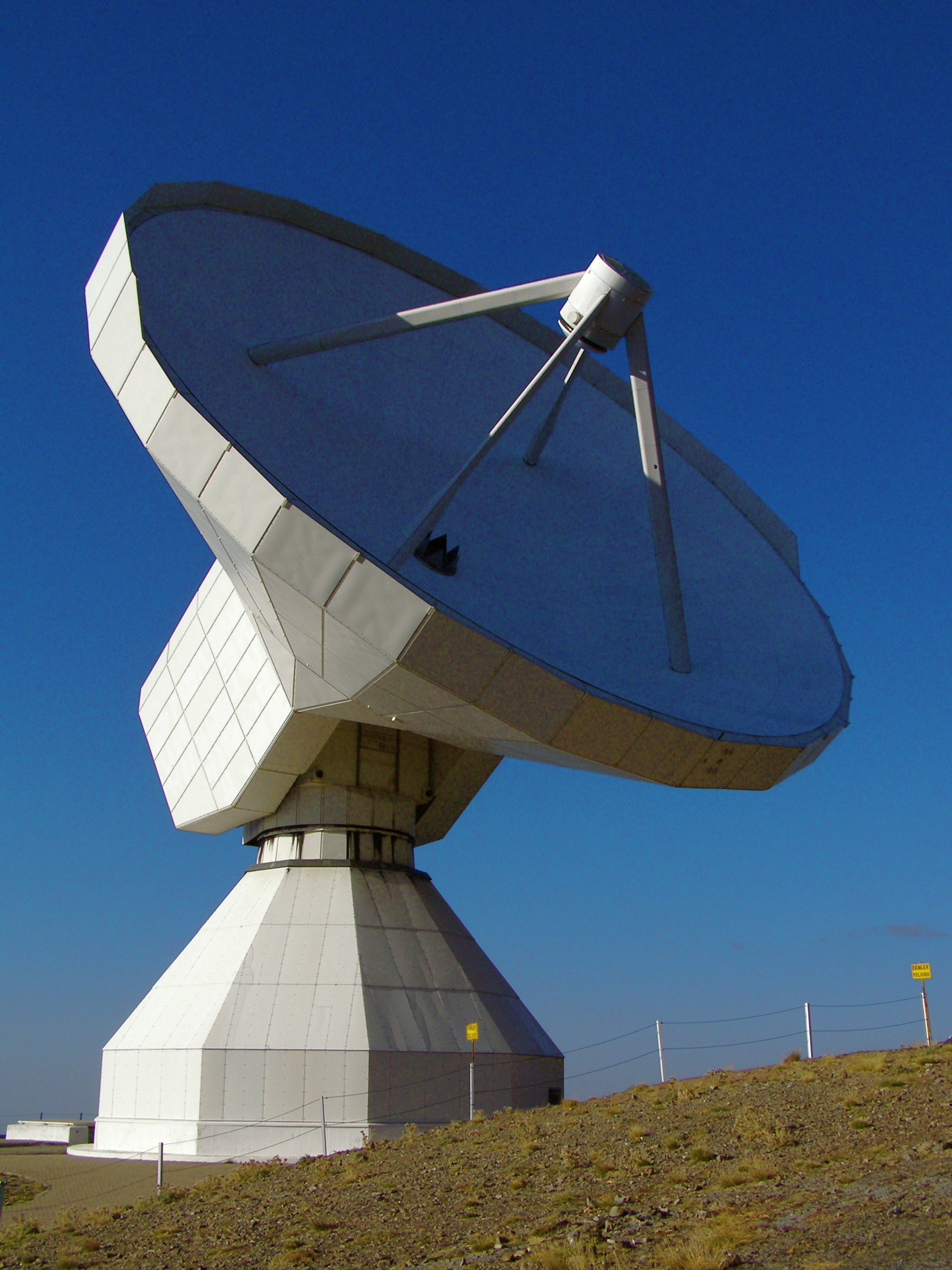 Das 30m-Radioteleskops des Instituts für Radioastronomie im Millimeterbereich.